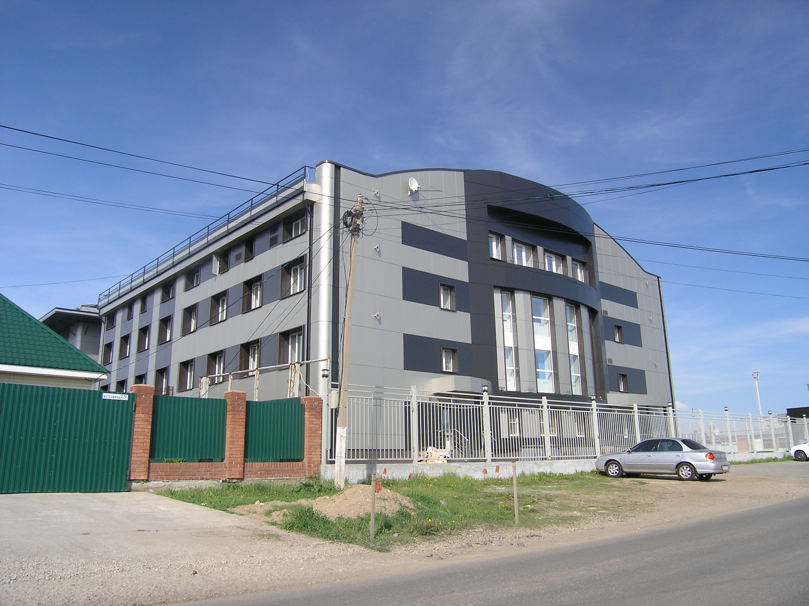 Здание администрации Академии футбола имени Юрия Коноплёва (бывшее здание автодилера ООО "Авто-1") Приморский. Ставропольский район Самарской области.